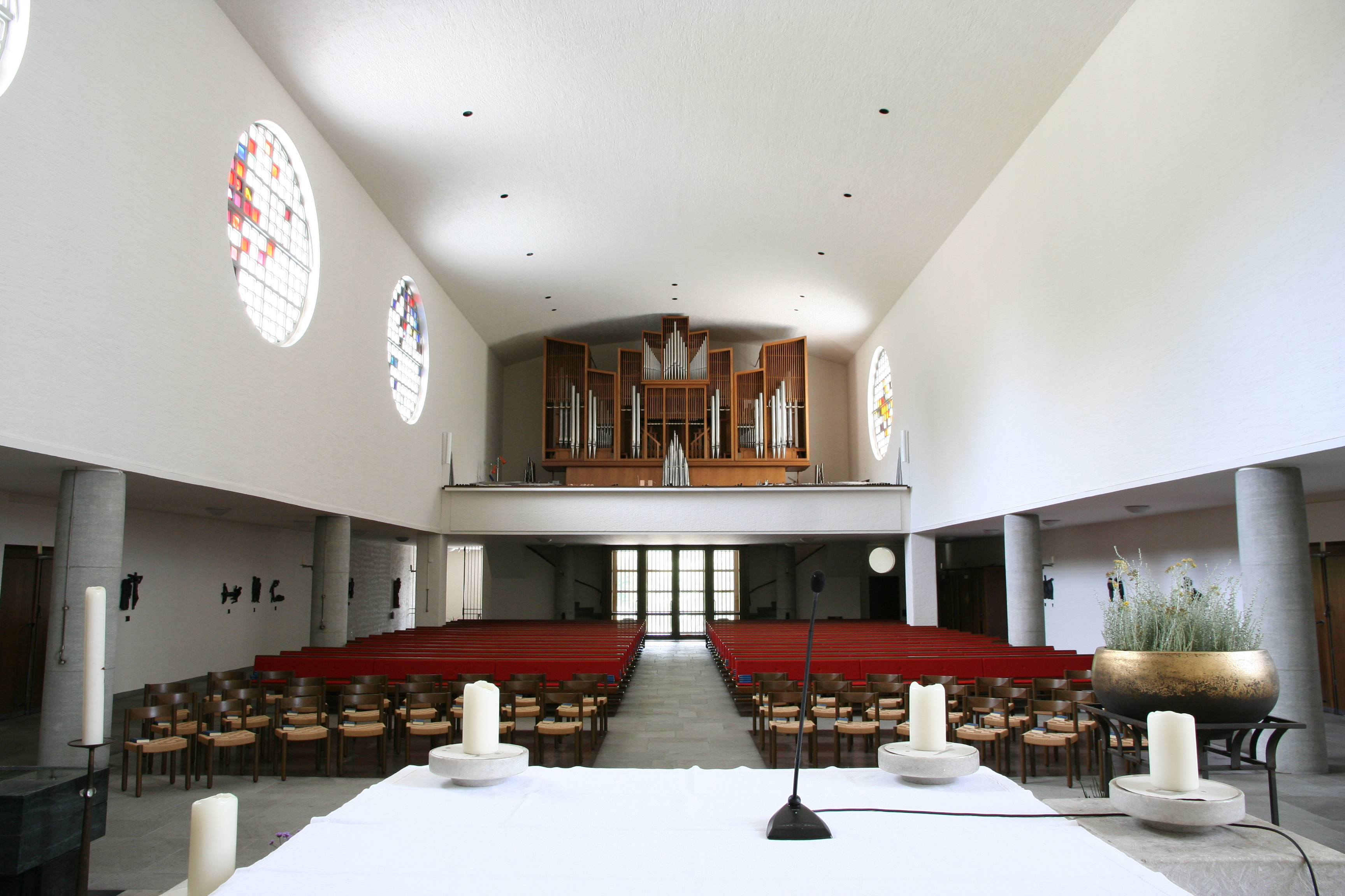 Römisch-katholische Pfarrkirche Maria Himmelfahrt Schönenwerd SO